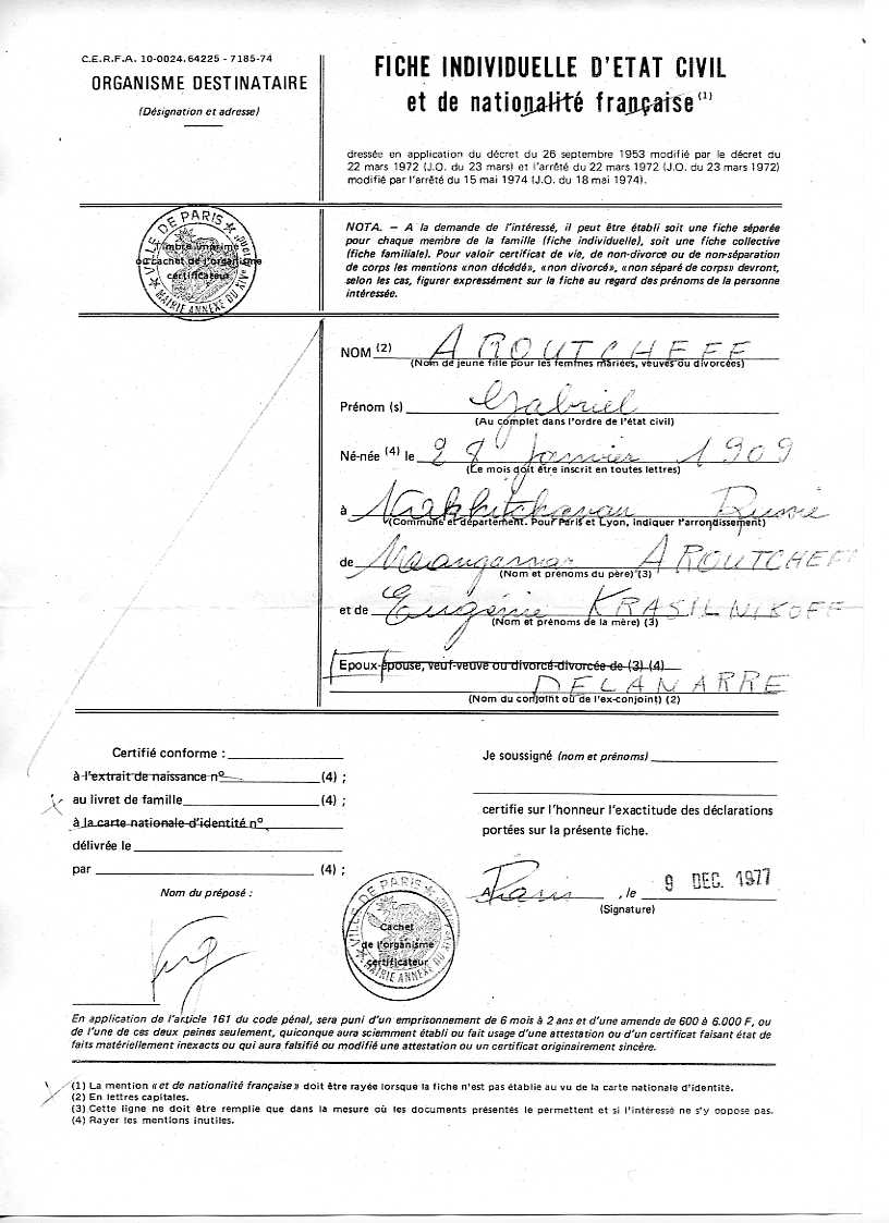 Fiche d'État-civil du dramaturge Gabriel Aroutcheff.